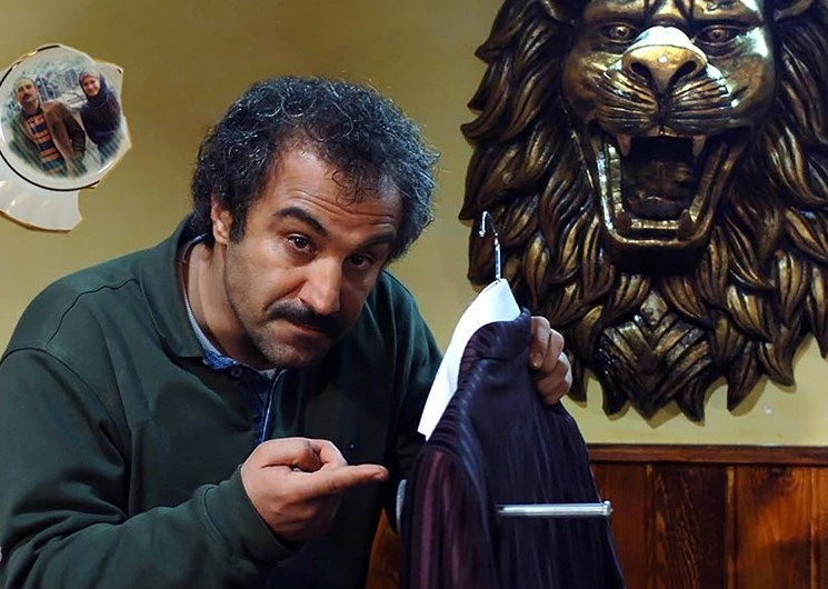 نقی معمولی